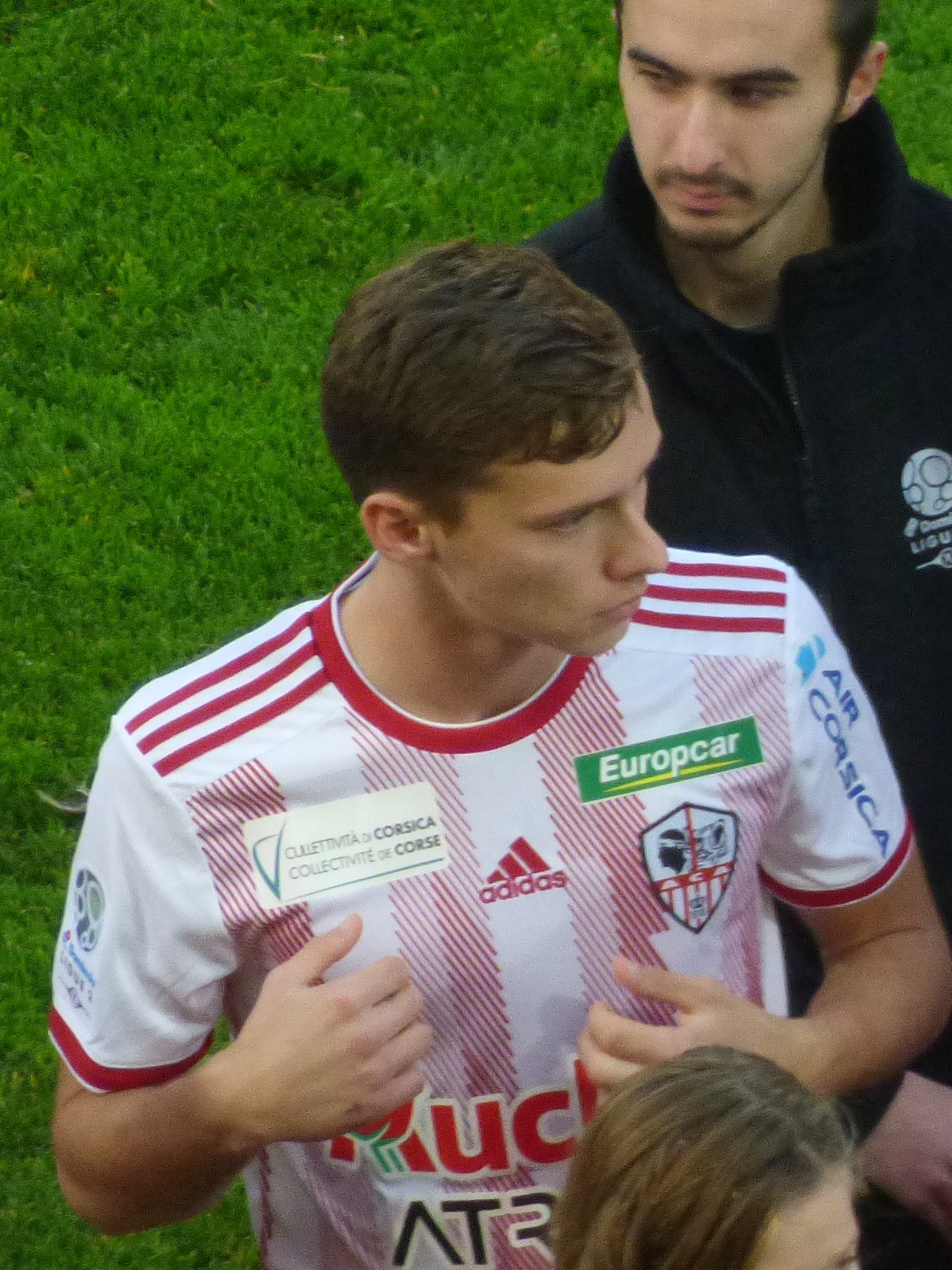 Matteo Tramoni avant le match RC Lens - AC Ajaccio, comptant pour la dix-neuvième journée du championnat de France de Ligue 2 2018-2019, le 22 décembre 2018, au Stade Bollaert-Delelis de Lens.